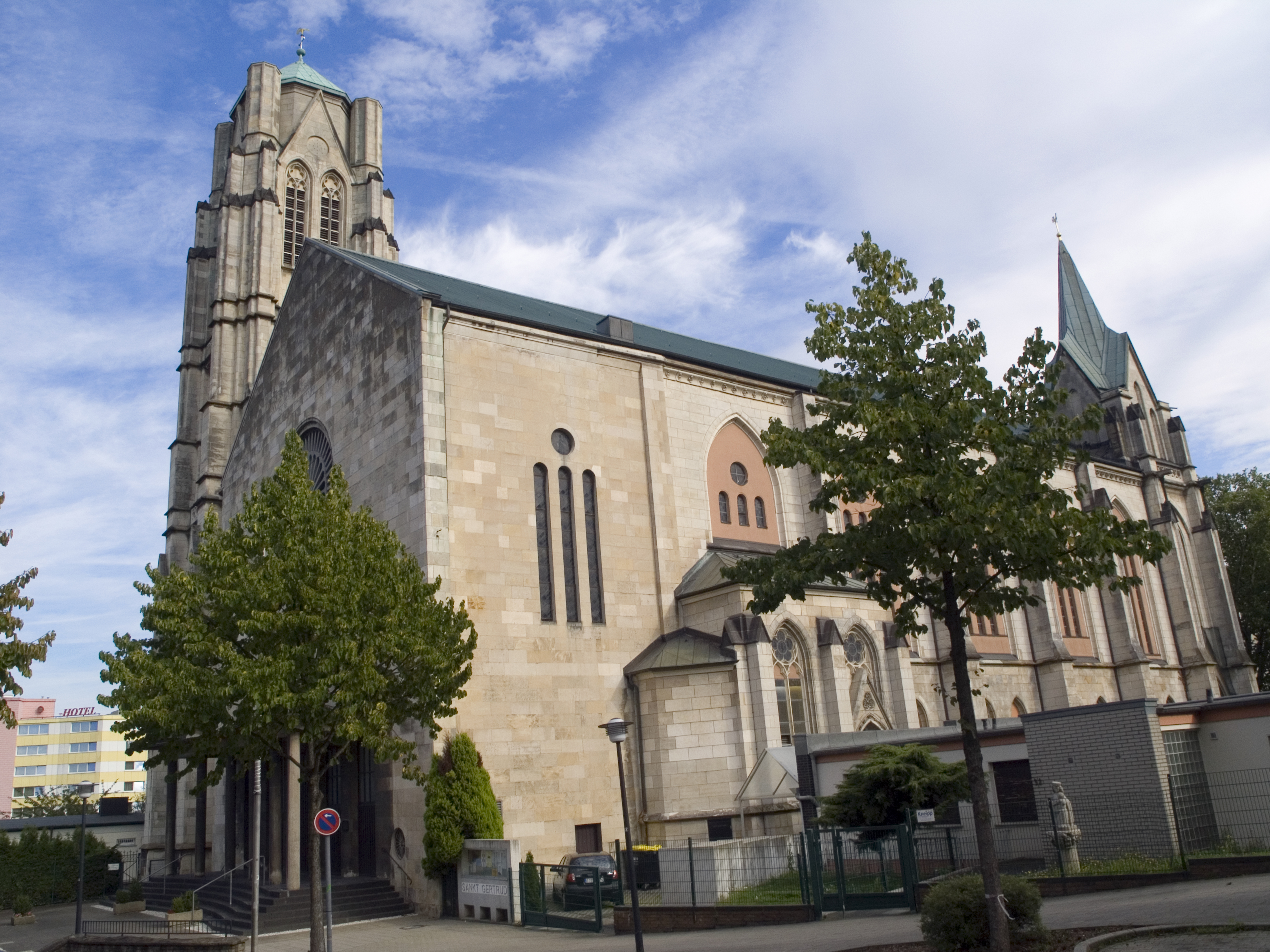 Северный Рейн - Вестфалия, Эссен - Церковь Святой Гертруды